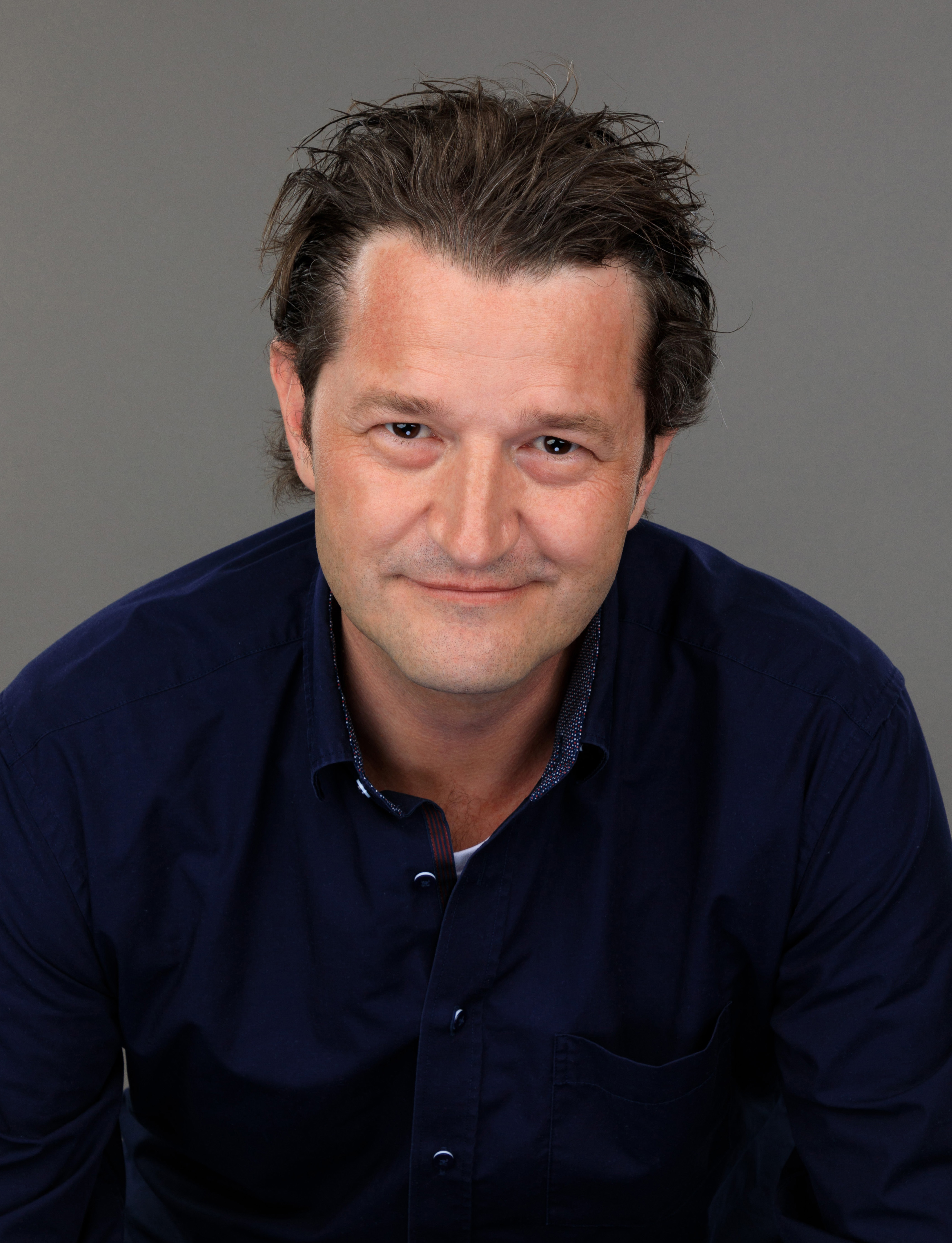 Pressefoto von Gerhard Walter zum Stück: "Auf mich war ich nicht vorbereitet"